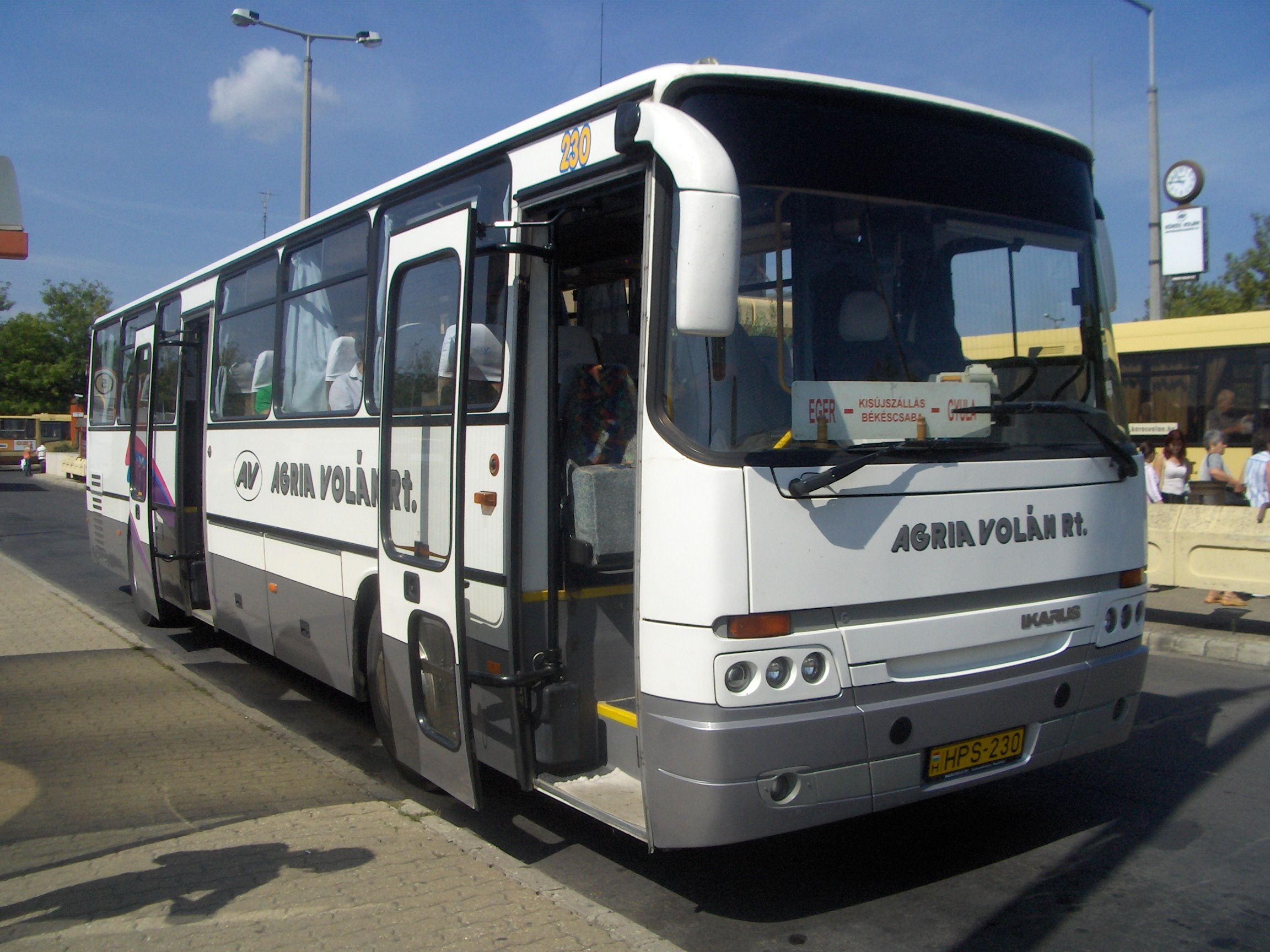 Ikarus Classic C56.22 Agria Volán